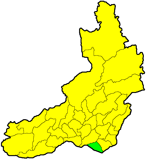 Забайкальский район на карте Забайкальского края